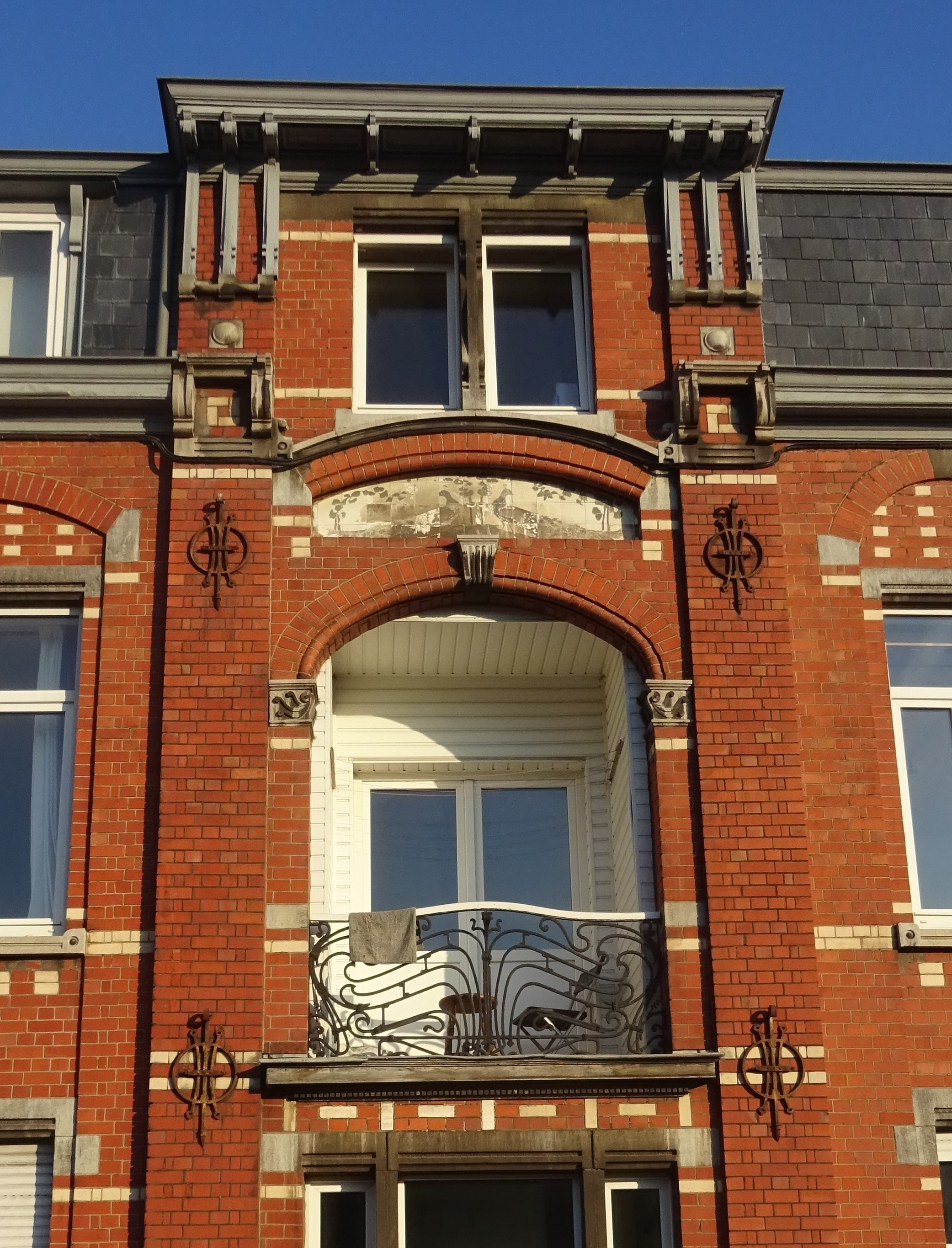 Séquence Devignée, Art nouveau, Liège